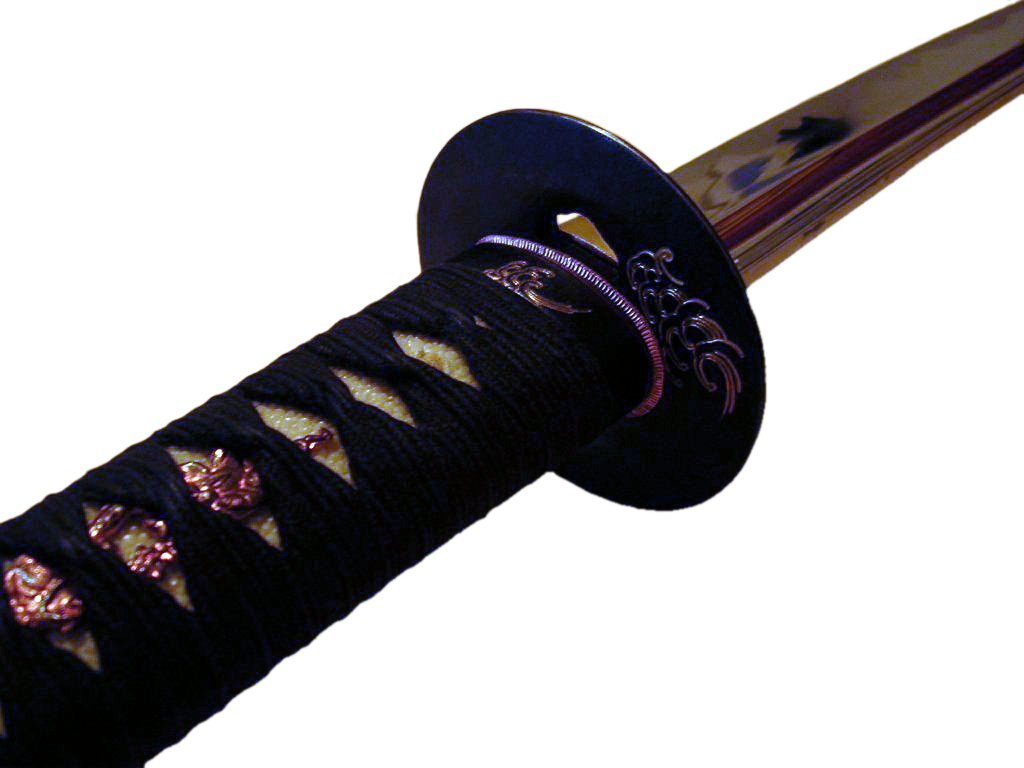 Tsuba (kitana)